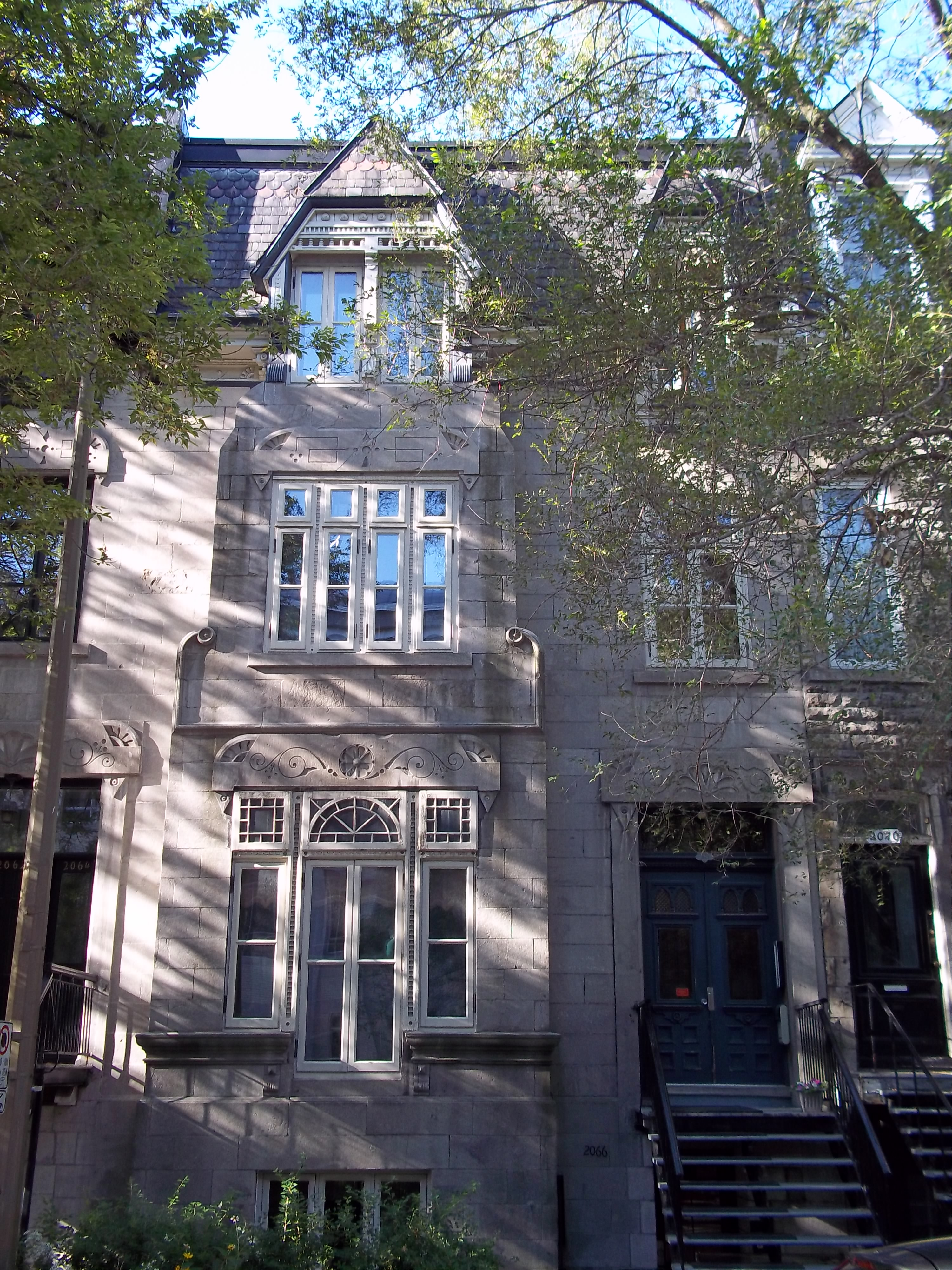 Maisons Janvier-Arthur-Vaillancourt, 2066-2068, rue Jeanne-Mance, Montréal